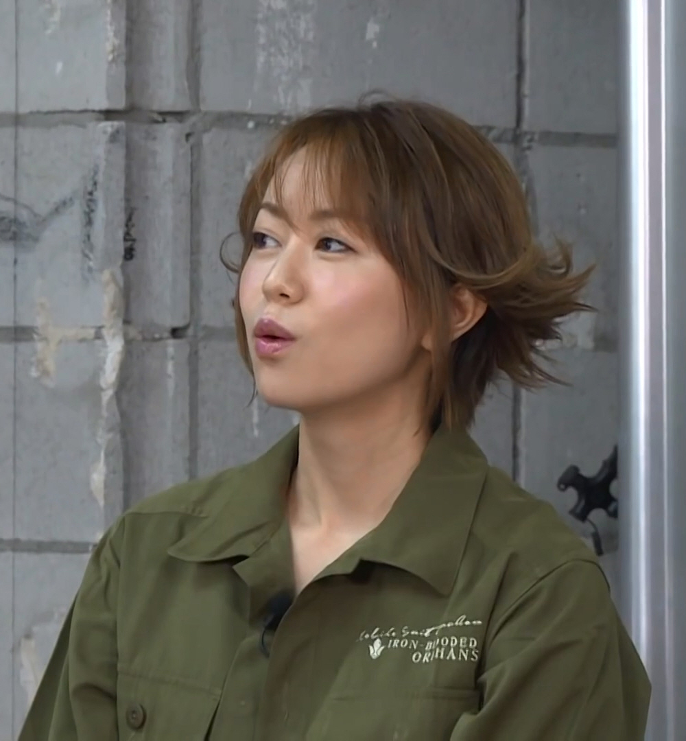 トライエイジチャンネル＃１ 鉄華繚乱5弾 先取りトライエイジ！